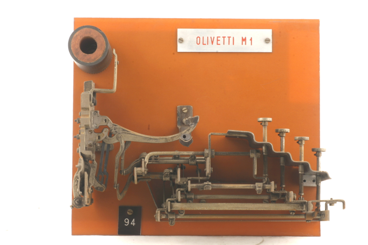 Il cinematismo, ripetuto per quattro tasti della macchina, è costituito da due elementi principali in acciaio collegati da un tirante. Il tasto è un pistoncino ammortizzato da una molla a compressione. Il pistoncino agisce su una manovella che fornisce una torsione ad un asse. Una serie di rimandi formato da un altro asse più corto e da due sistemi a biella-manovella, trasforma la torsione del primo asse in spinta verticale sulla corrispondente leva del martelletto portacaratteri (riportanti, rispettivamente dal più avanza al più arretrato: "H" e "h", "7" e "è", "N" e "n", "U" e "u"). I bottoni dei tasti sono in celluloide trasparente con sfondo bianco e riportano, rispettivamente da quello posto più in alto a quello più in basso, i caratteri: "7" e "è", "U" e "u", "H" e "h", "N" e "n". Il cinematismo è fissato ad un pannello in bachelite Sul retro del pannello, come rinforzo, è posta una placca di alluminio. Funzione Stampa del carattere tipografico da parte di una macchina per scrivere. Notizie storico-critiche La collezione consiste in 241 cinematismi di macchine per scrivere, fissati su un supporto in bachelite e originariamente sistemati in 11 pannelli di 199 x 104 cm con intelaiatura in alluminio. I pannelli erano identificati con una lettera da A ad L, con K finale. I cinematismi, a loro volta, sono numerati con un cartellino da 1 (pannello A) a 230 (pannello K), per riprendere da 1 a 9 (pannello K, con cartellino differente). Nel 2008, per esigenze conservative, i pannelli sono stati smantellati e i singoli cinematismi sono stati ricollocati in appositi contenitori La collezione è stata raccolta in un trentennio circa da Matteo Calizzano, progettista di macchine per scrivere, che ha lavorato presso la Antares e la Olivetti. La collezione è stata donata dalla figlia, Ada Calizzano, nel 1987.